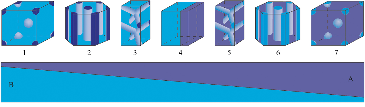 Морфологии структур диблок-сополимеров AB, наблюдаемые при изменении их состава: 1 — сферические домены A; 2 — цилиндрические домены A; 3 — битетраэдрическая (A) структура; 4 — ламеллярная структура; 5 — битетраэдрическая (B) структура; 6 — цилиндрические домены B; 7 — сферические домены B. В нижней части рисунка приведена шкала соотношений количества компонентов A и B, при которых наблюдаются данные виды упорядочения.